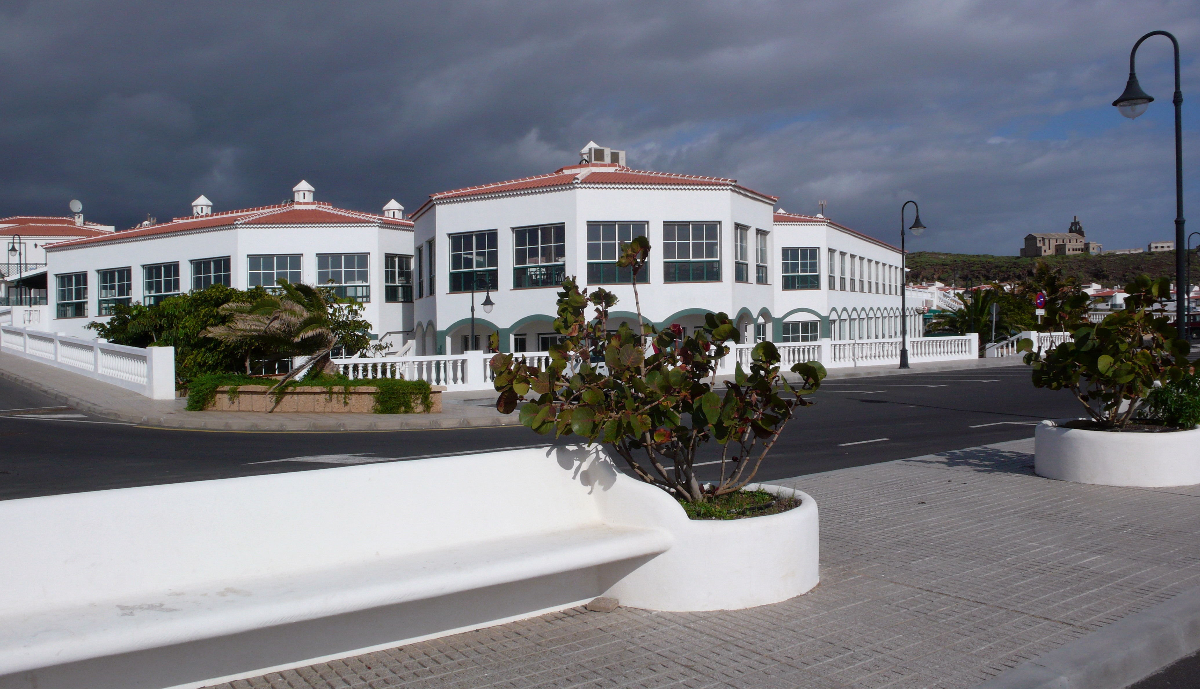 Centro comercial en Abades. Sanatorio al fondo.